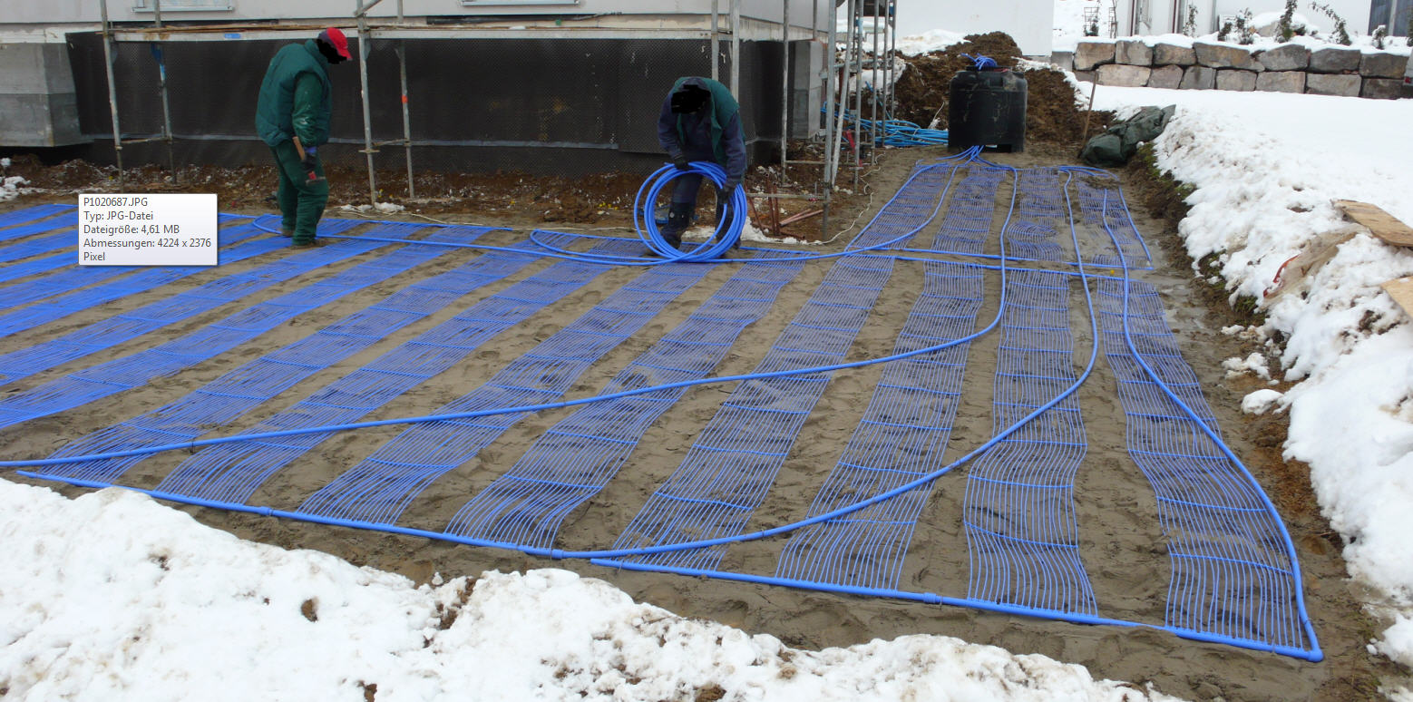 Verlegung eines Flächenkollektors für eine Wärmepumpe